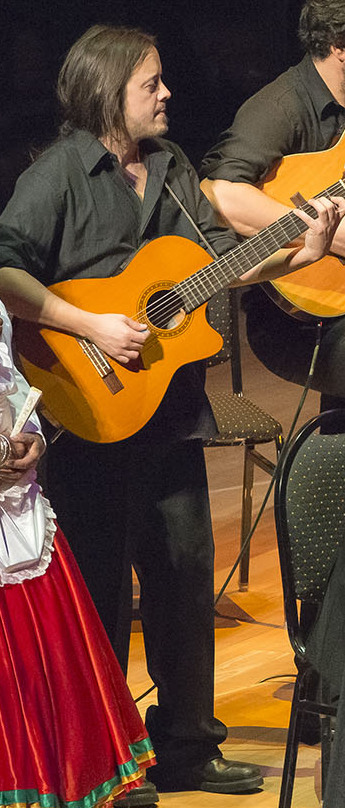 Buenos Aires, 23 de Agosto de 2015 - El cantante, compositor y músico uruguayo Rubén Rada presentó su disco “Tango, milonga y candombe” el domingo 23 de agosto en el auditorio La Ballena Azul del Centro Cultural Kirchner, como parte del ciclo Música del Sur.- Fotos: Manuel Pose Varela / CCK